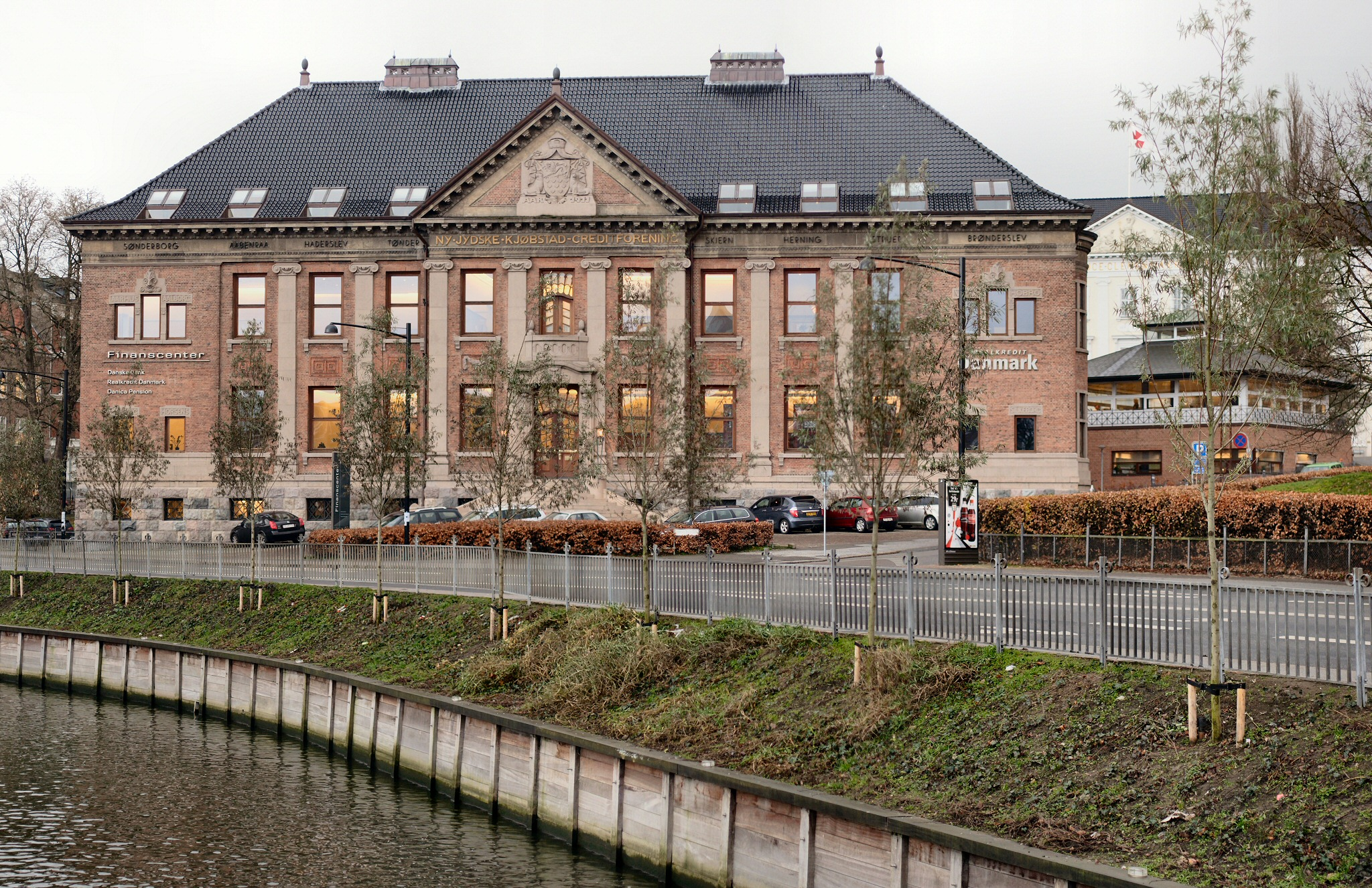 Realkredit Danmark i Århus